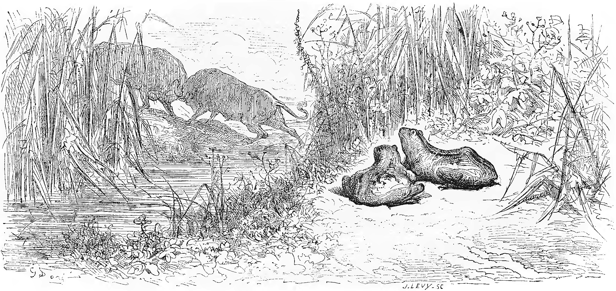 grafika z książki PL Bajki, Jean de La Fontaine, nakładem i drukiem Jana Noskowskiego, Warszawa 1876